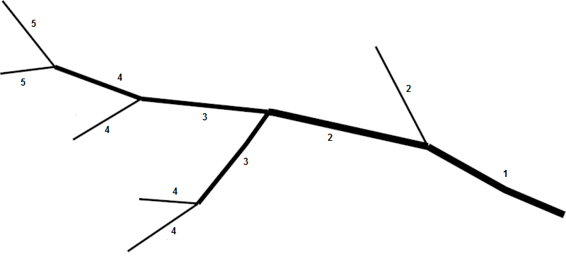 Categorización orográfica de la red de drenaje de una cuenca hidrográfica